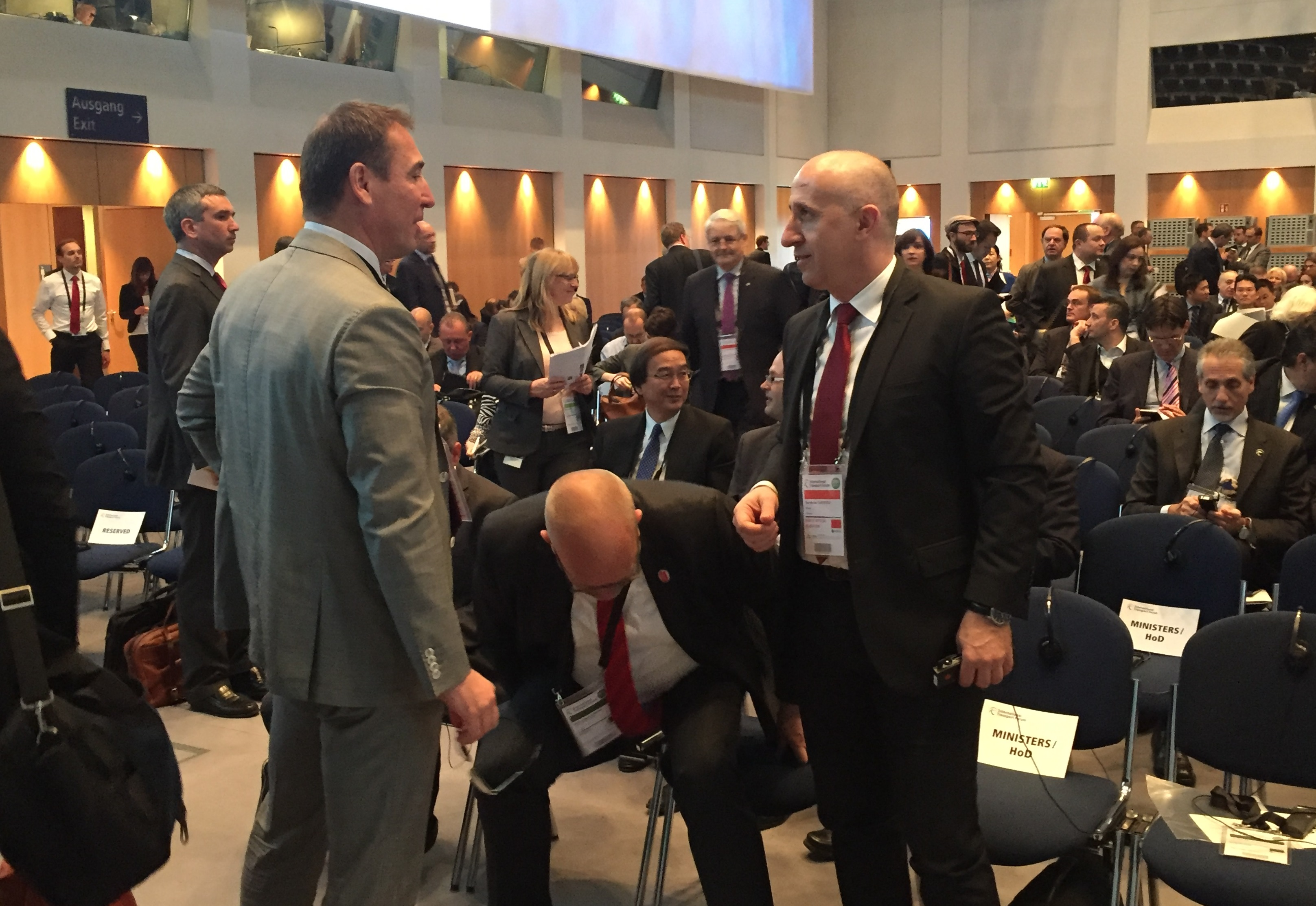 Discutie cu Roman Brecely, ministrul Transporturilor din Slovacia, pe tema liniilor aeriene nationale